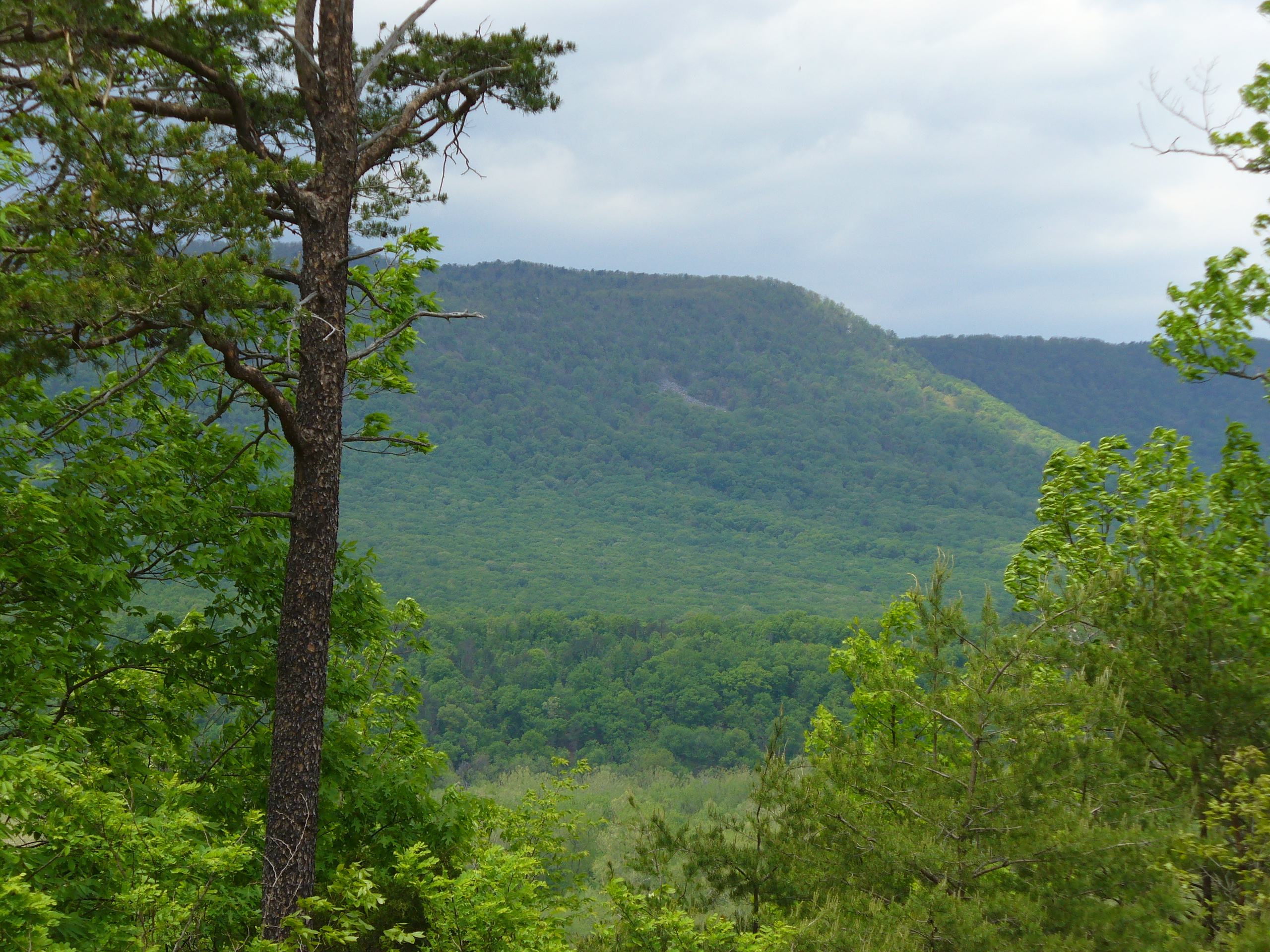 SH- Culler's Overlook